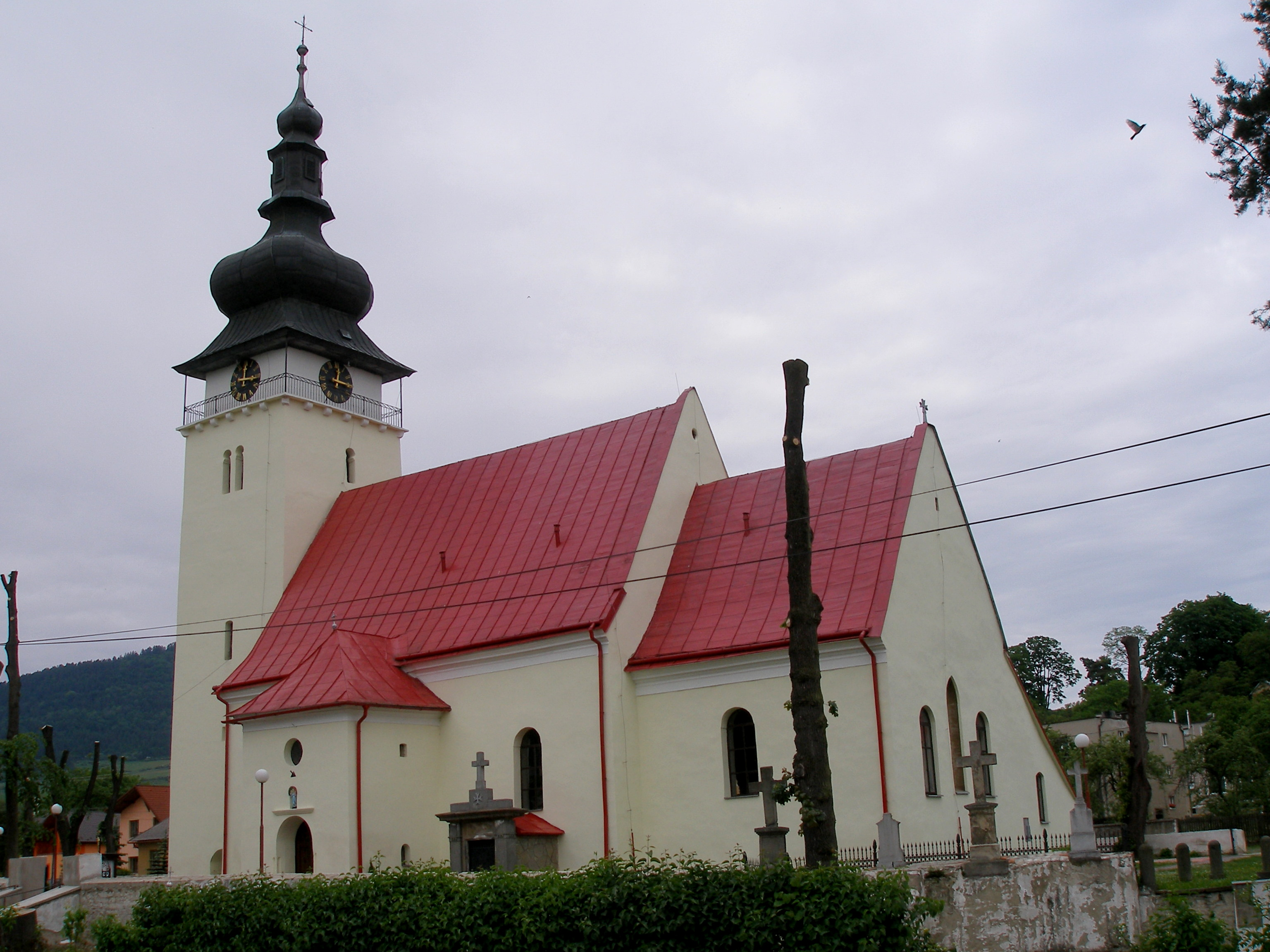 Obec Brezovica okres Sabinov. This medium shows the protected monument with the number 708-270/0 (other) in the Slovak Republic.